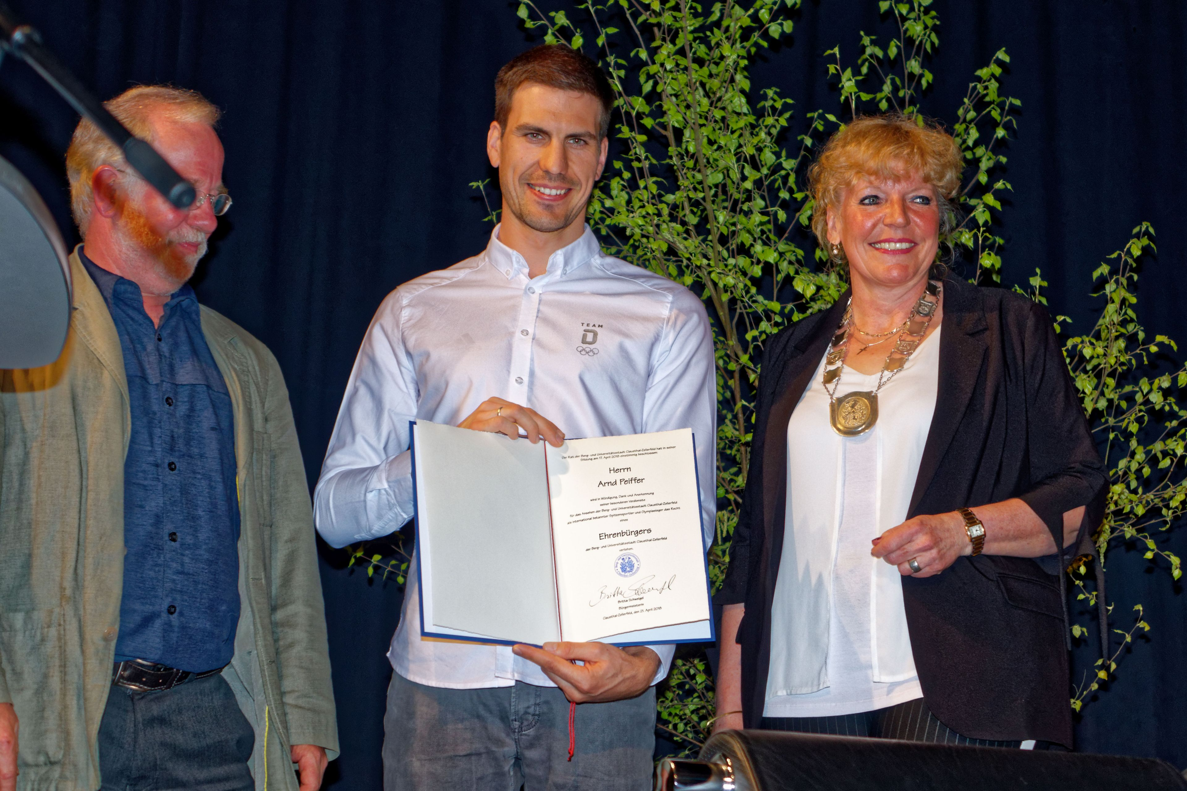 Verleihung der Ehrenbürgerschaft von Clausthal-Zellerfeld an Arnd Peiffer (Bildmitte) am 21.04.2018 der in Stadthalle Clausthal durch die Bürgermeisterin Britta Schweigel (rechts)